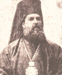 Гръцки духовник, митрополит на Цариградската патриаршия.